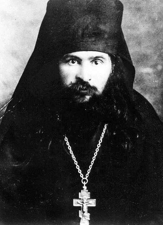 Српски (ћирилица): Јеромонах Јован (Максимович) у Београду 11. 5. 1934.